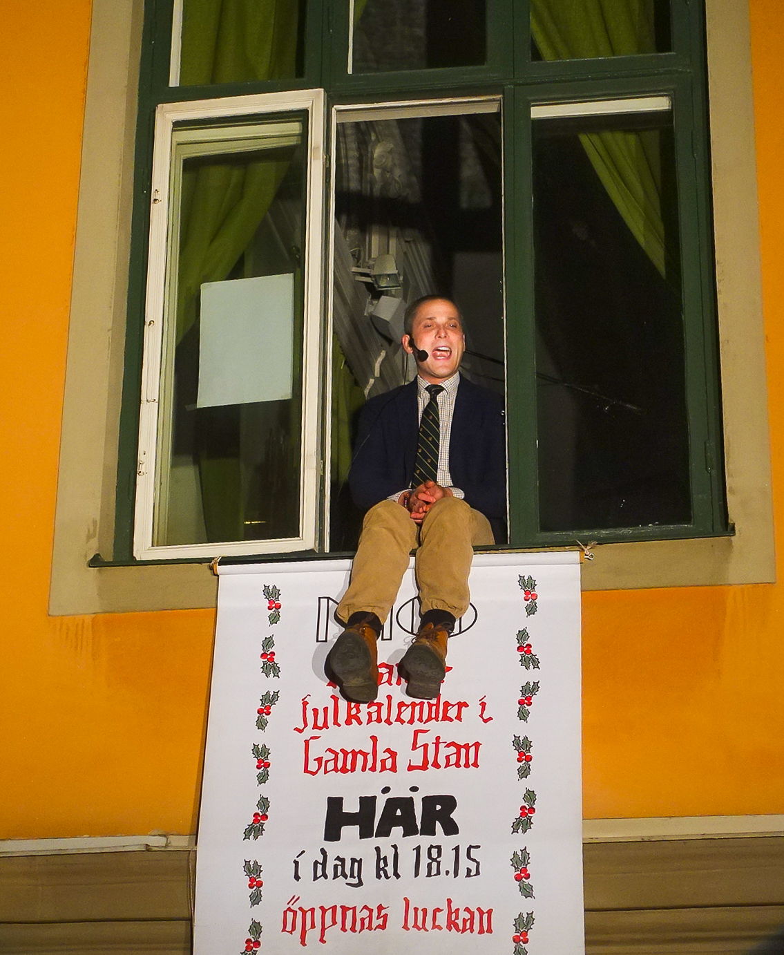 Christopher O'Regan i lucka 21 i Gamla stans levande julkalender 2019. Arrangör: Mäster Olofsgården.